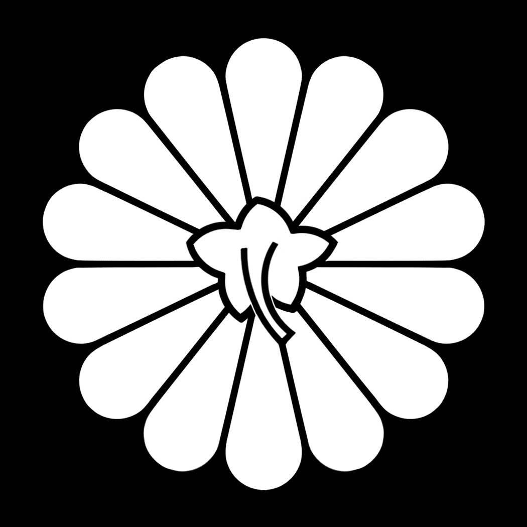 「十六葉裏菊」紋（染抜）